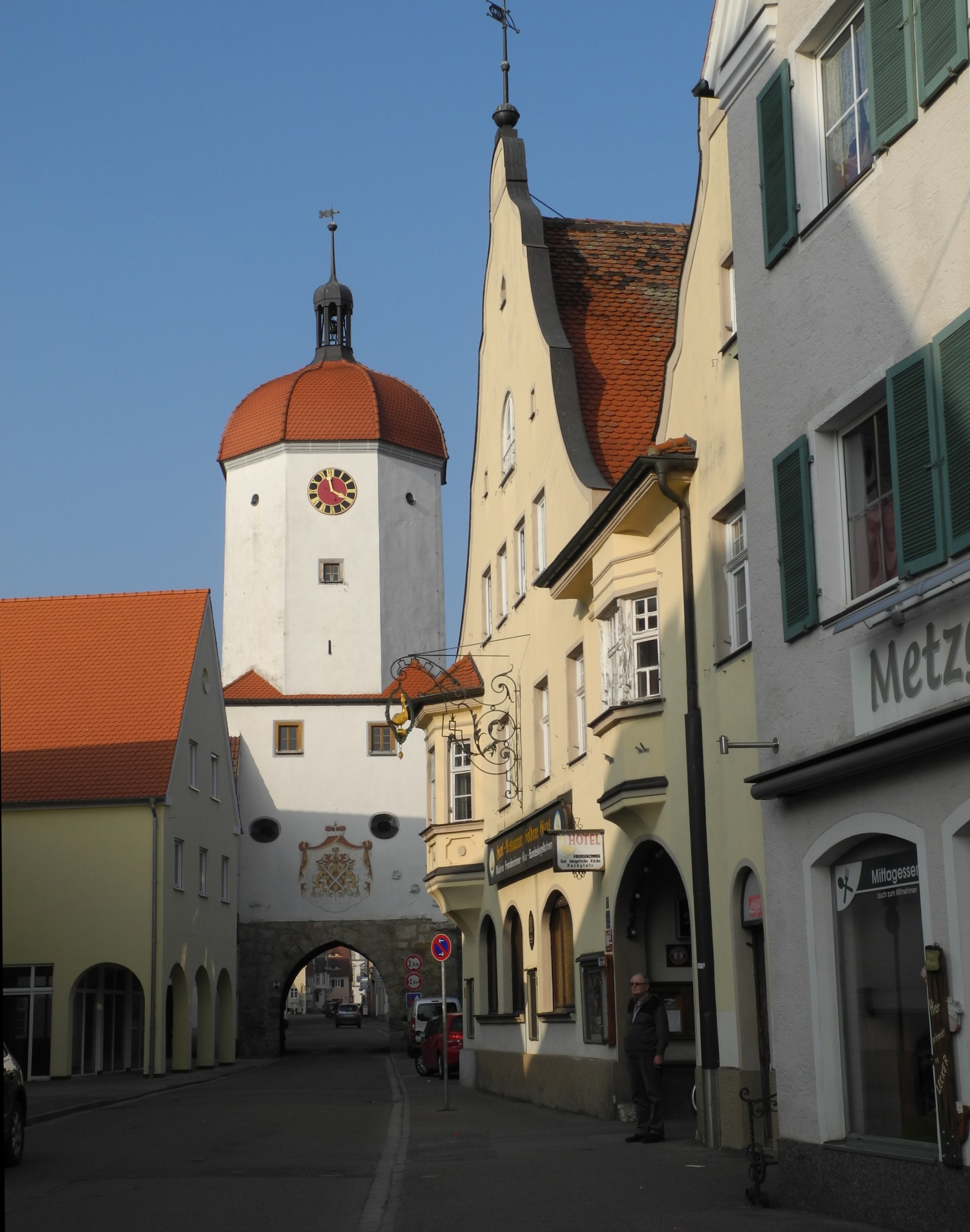 Oettingen in Bayern - Königstor ab 13.Jh